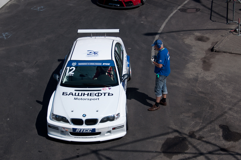 2-й этап RTCC "Курская Дуга", Курск.